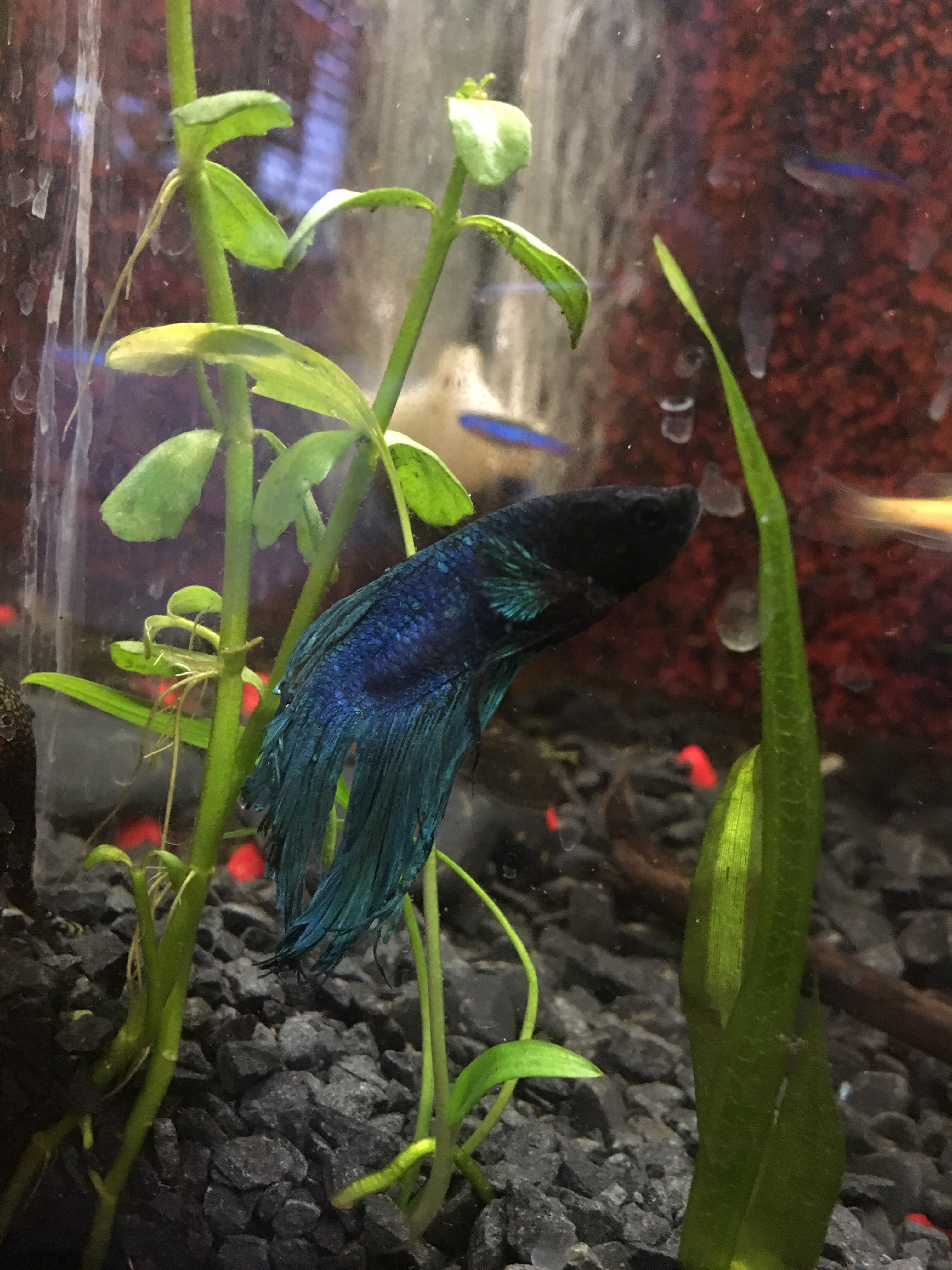 Сиамская бойцовая рыбка (проще говоря петушок) заболел костиозом. Слиплись плавники, пропал аппетит, начал ото всех прятаться, вскоре начал разлагаться на глазах и терять ориентацию, из за чего рыбку пришлось усыпить.